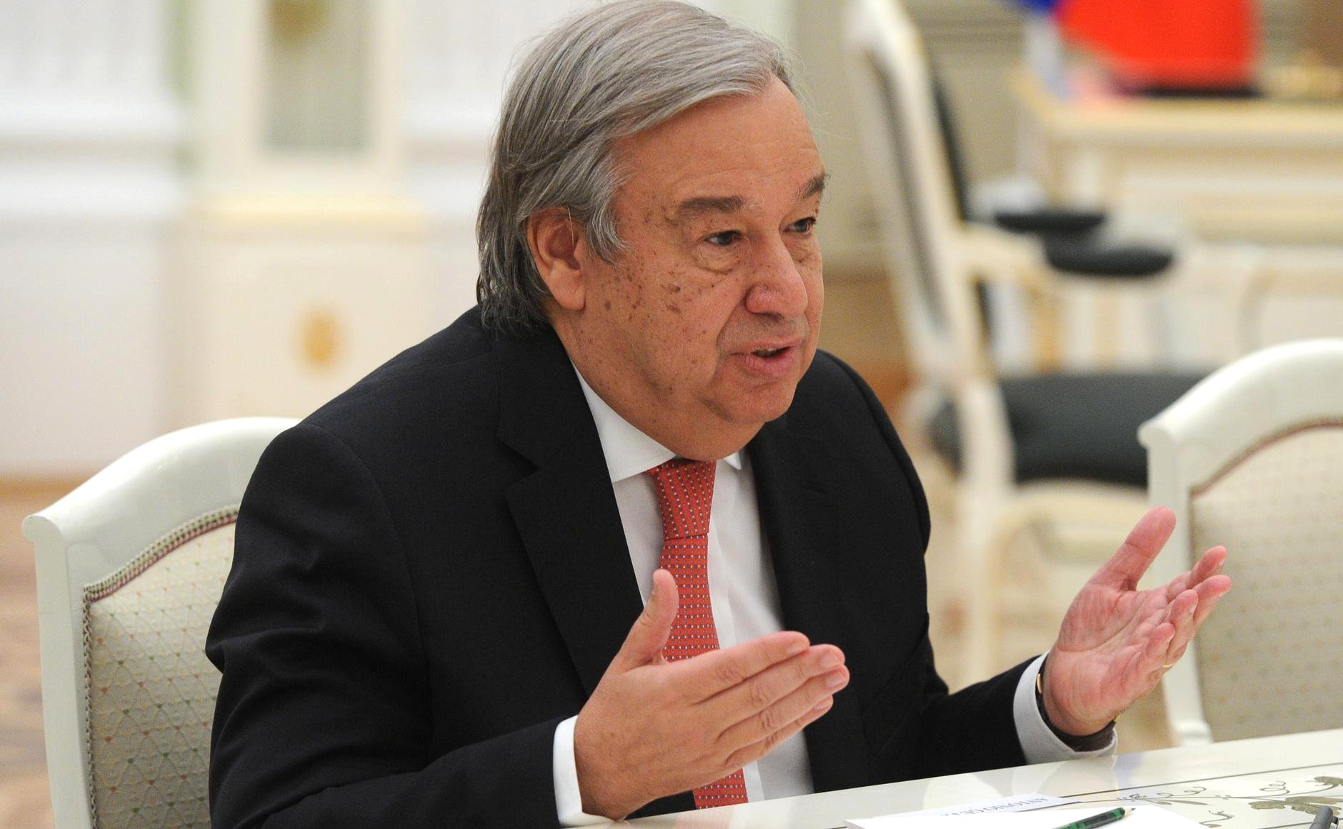 Избранный Генеральный секретарь Организации Объединённых Наций Антониу Гутерреш